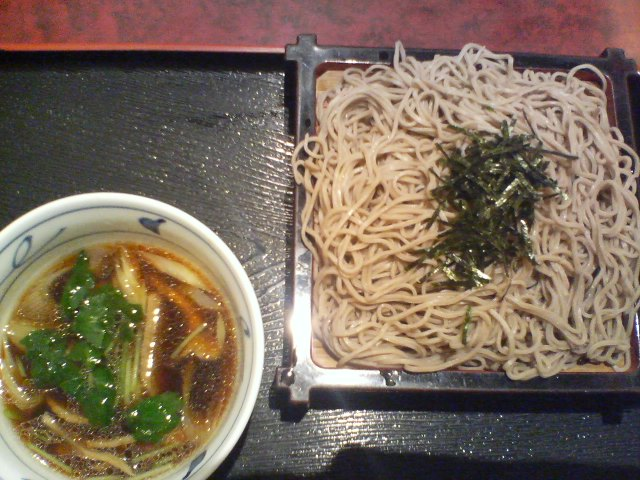 華屋与兵衛。